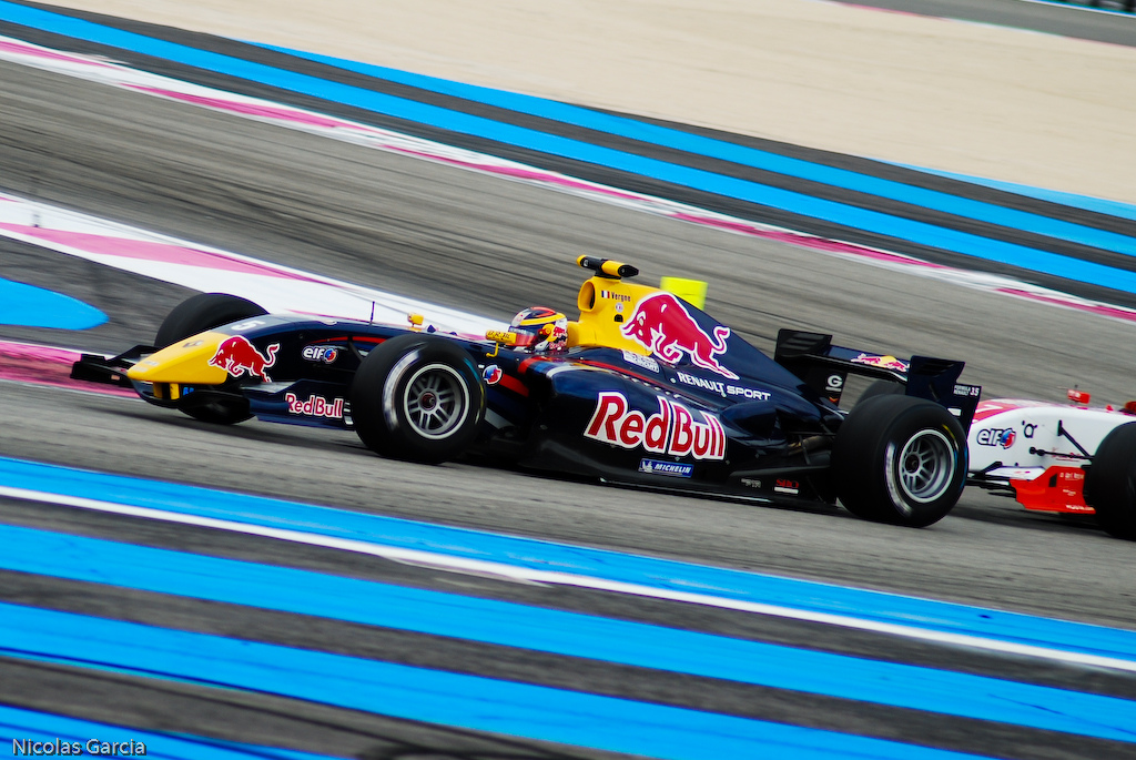 #5 Jean-Éric Vergne - Carlin - 2011 Formula Renault 3.5 Series - Circuit Paul Ricard - Race 2